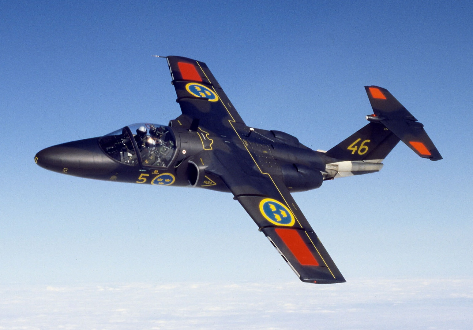 Saab 105OE